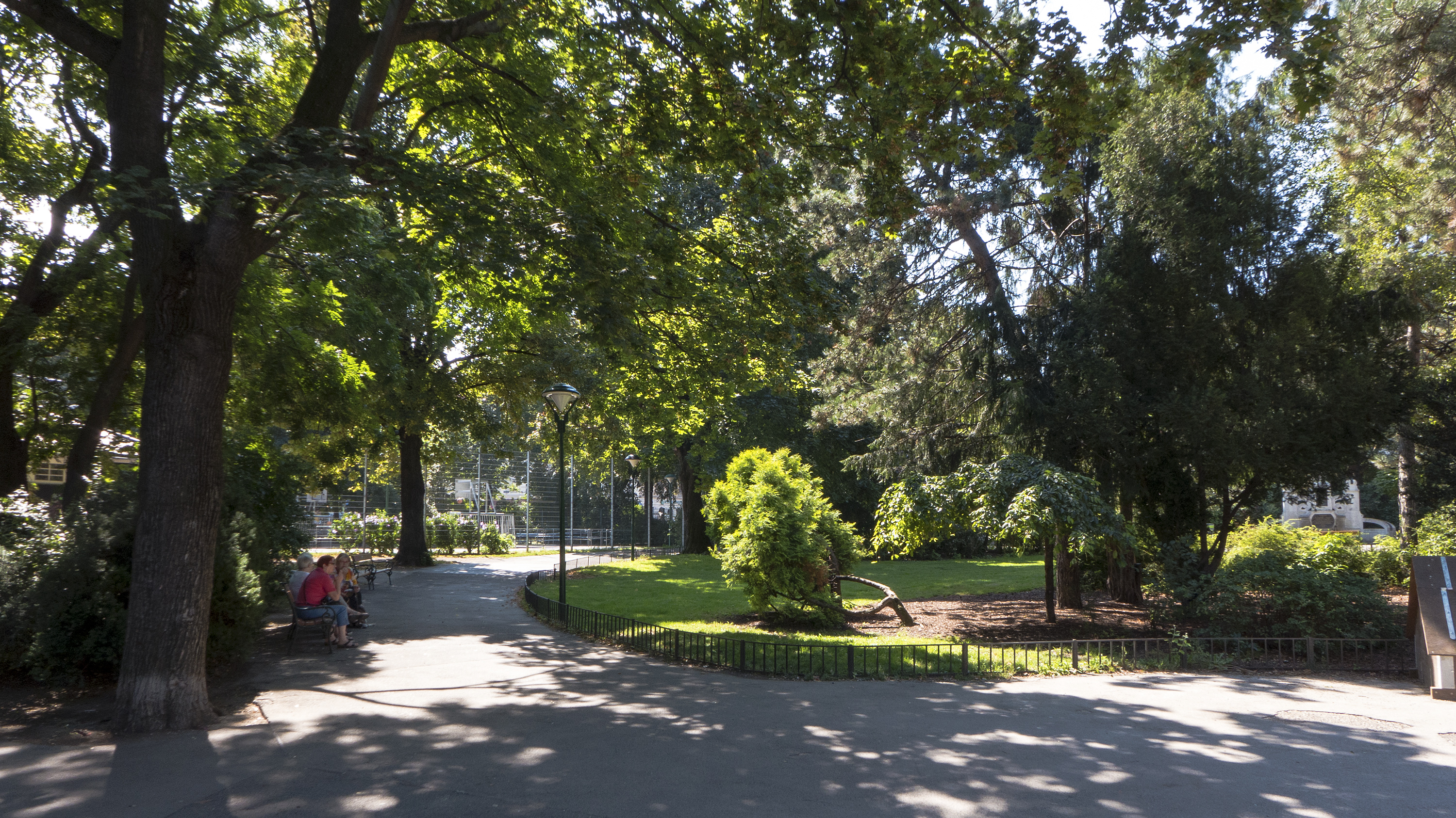 Arthaberplatz in Wien 10